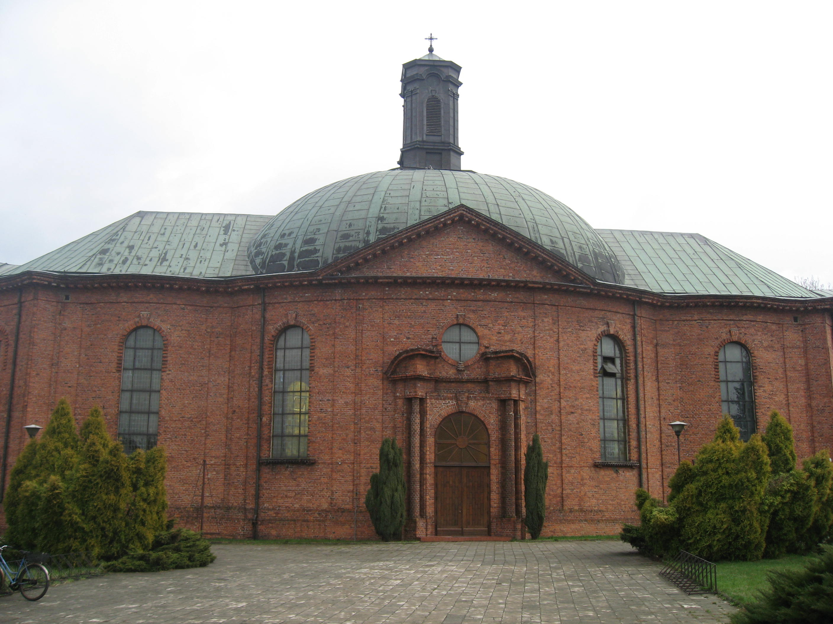 Kościół pw. św. Józefa w Jankowie Przygodzkim, u zbiegu dróg prowadzących do Ostrowa Wlkp., Przygodzic, Tarchał Wielkich i Trzcielin (Dębnicy), przy trasie rowerowej Ostrów Wlkp.- Antonin